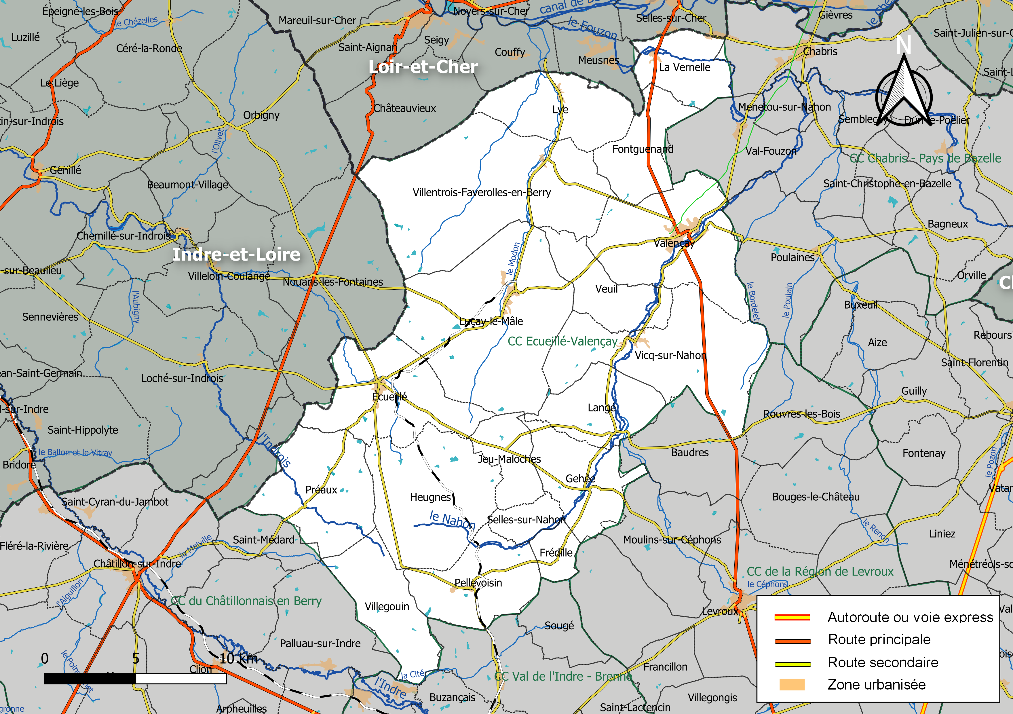 Carte de la communauté de communes Ecueillé-Valençay, département de l'Indre, France. Composition au 1er janvier 2019.